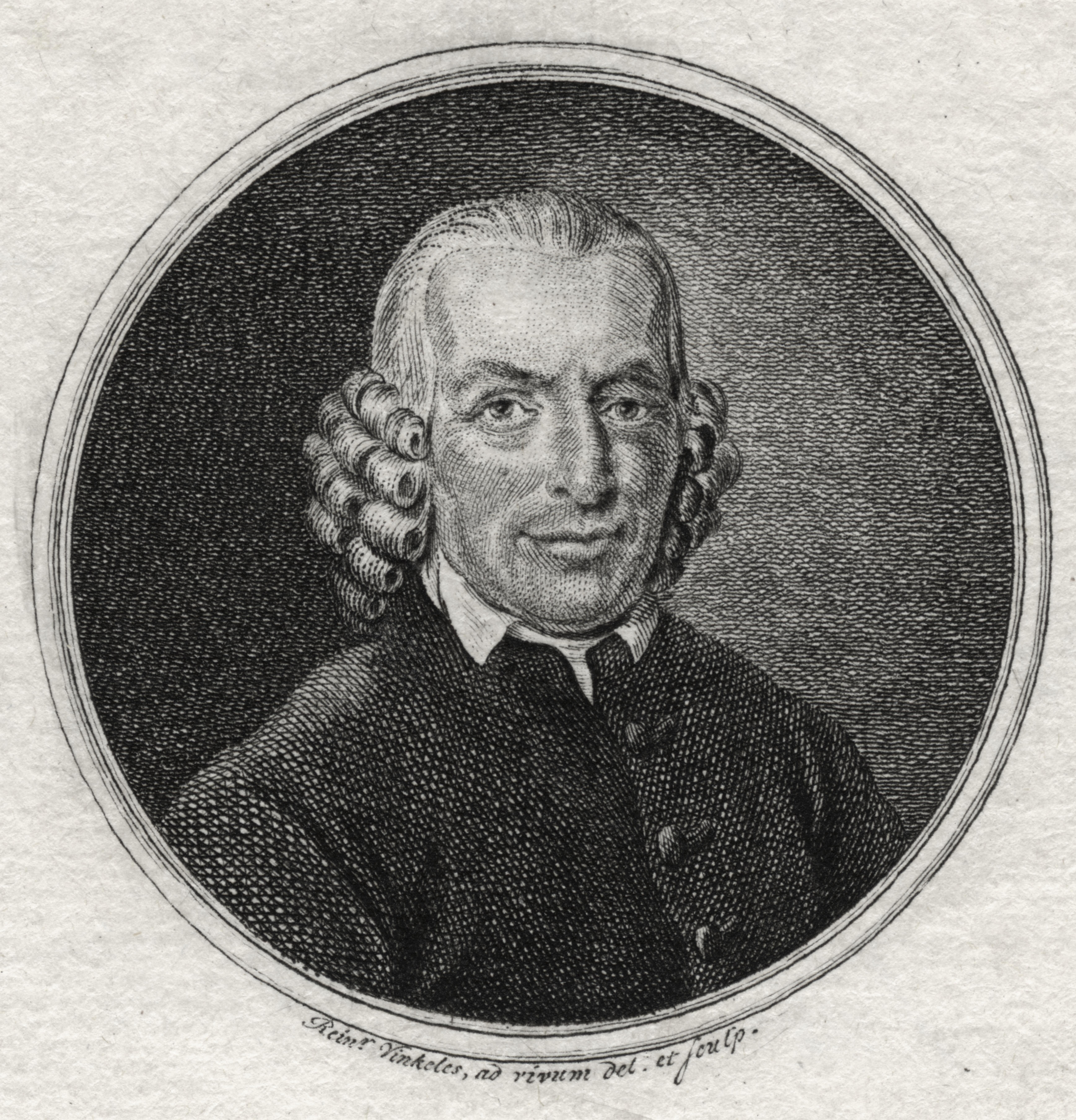 portret van de predikant Wilhelmus Antonius van Vloten (1740-1809)